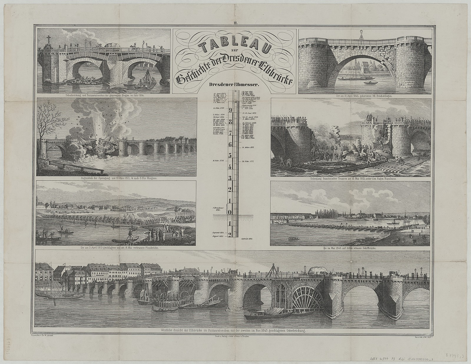 Tableau zur Geschichte der Dresdener Elbbrücke (Augustusbrücke), mit Dresdener Elbmesser, entworfen von Wilhelm Schäfer, „gezeichnet und lithographiert von Wilhelm Gottlieb Baisch“, 1848.